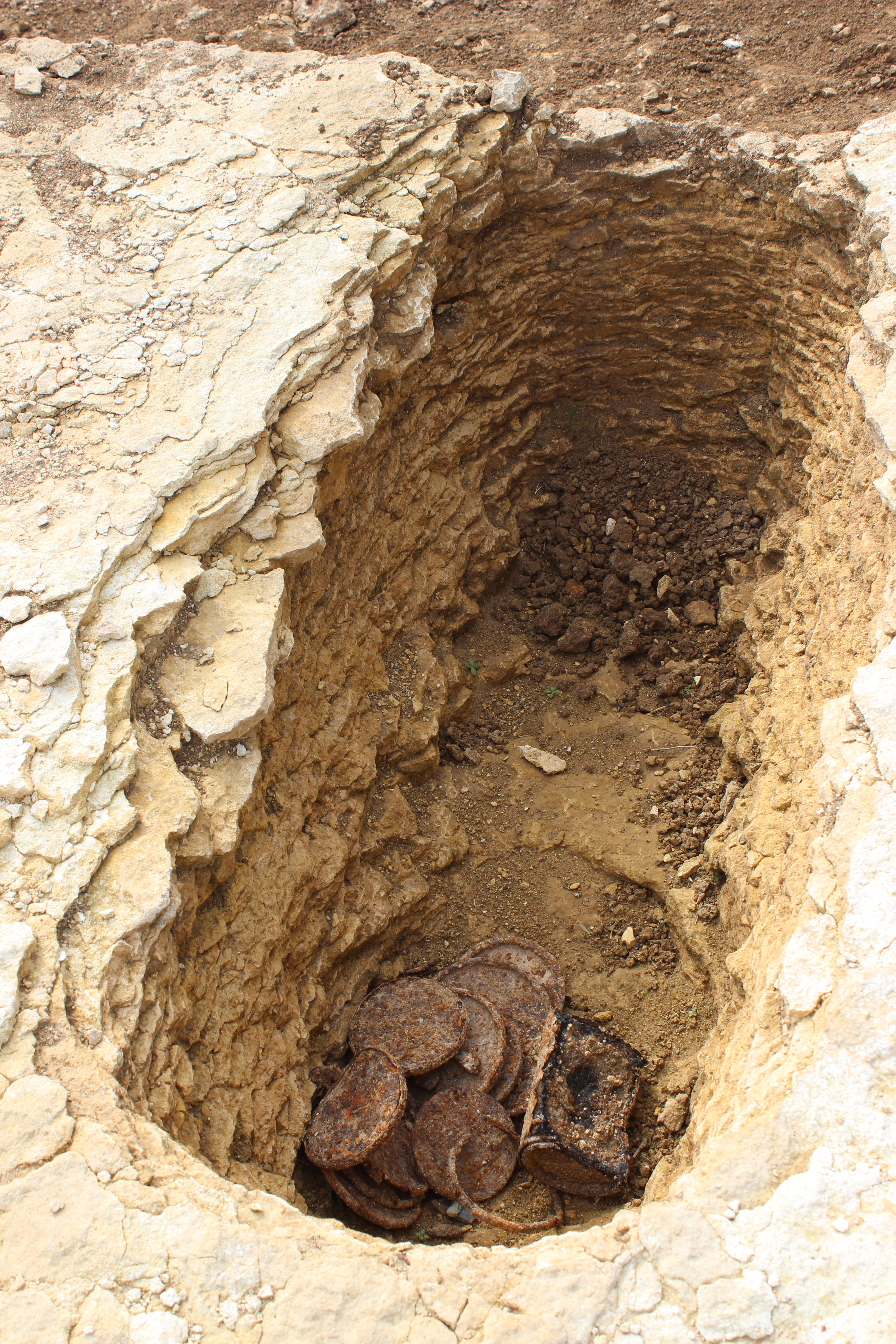 nécropole néolithique